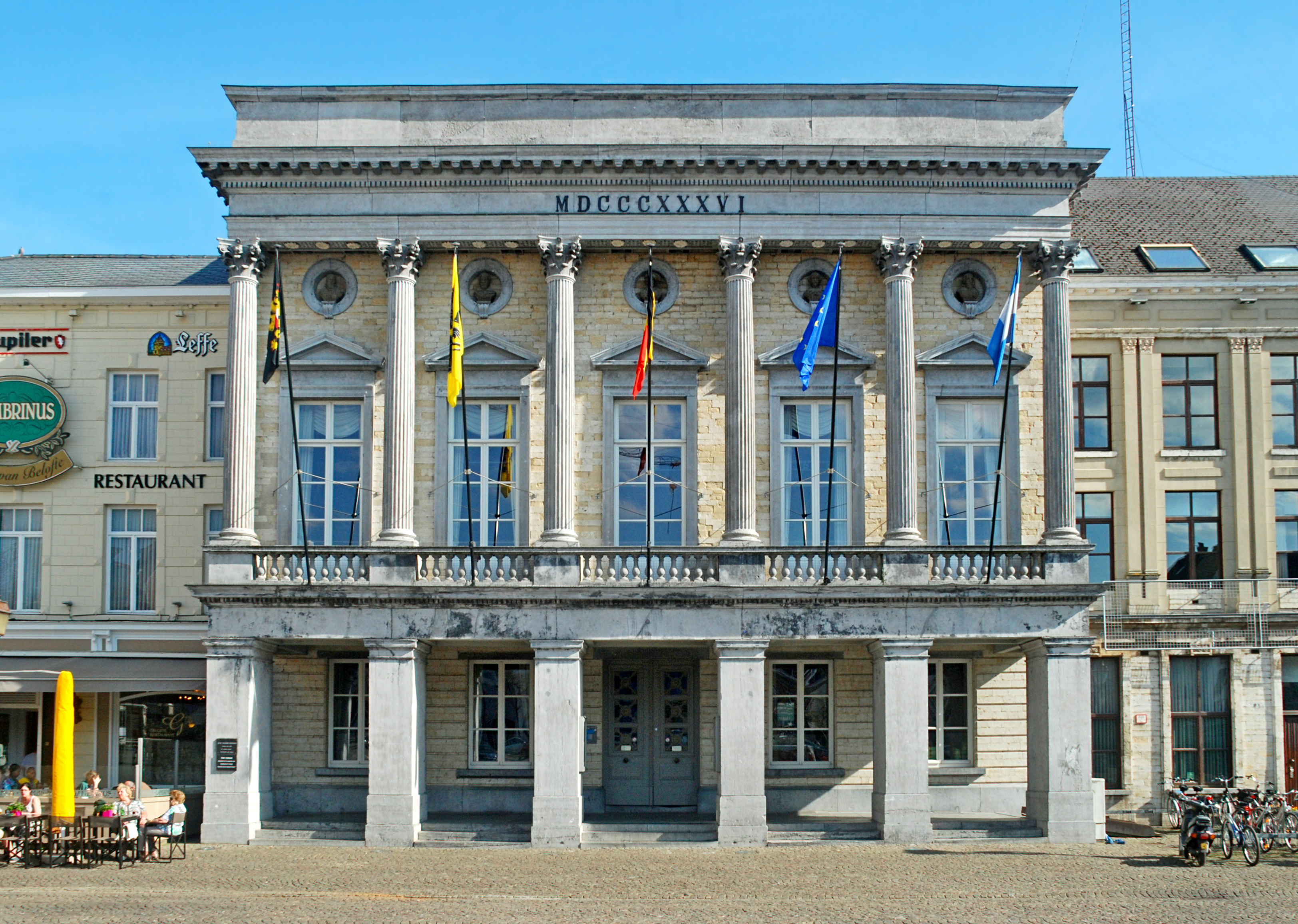 Belgique - Brabant flamand - Tirlemont (Tienen) - Hôtel de ville